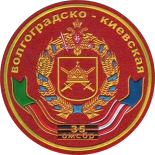 Нарукавный знак 35-й ОМСБр (Алейск)